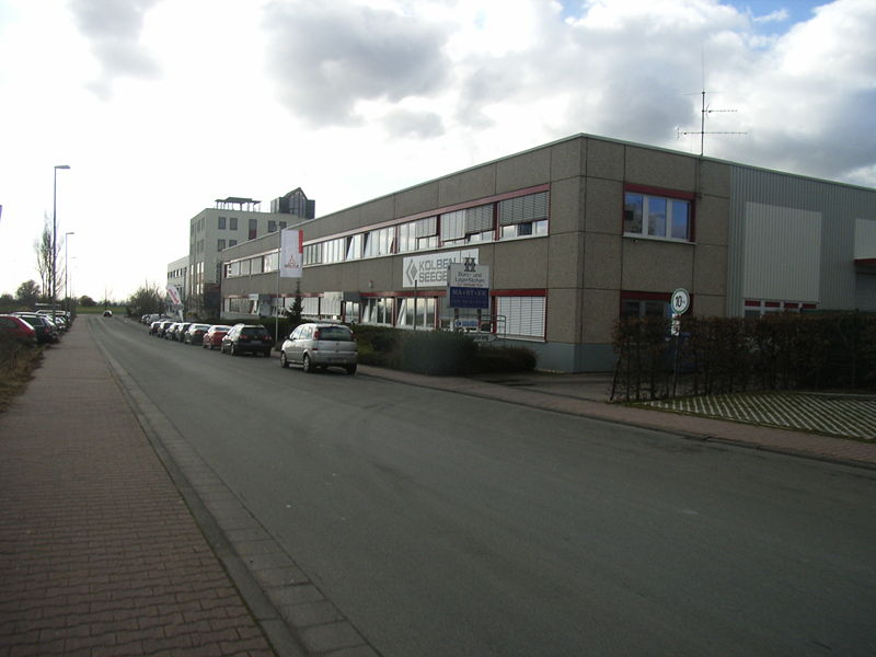 Ansicht des Gewerbegebietes